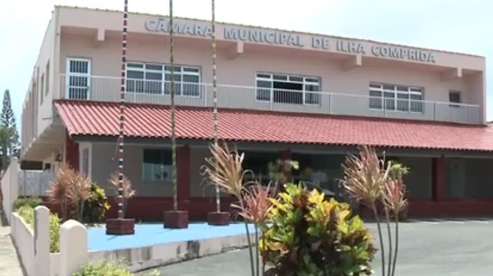 Camara Municipal de Ilha Comprida